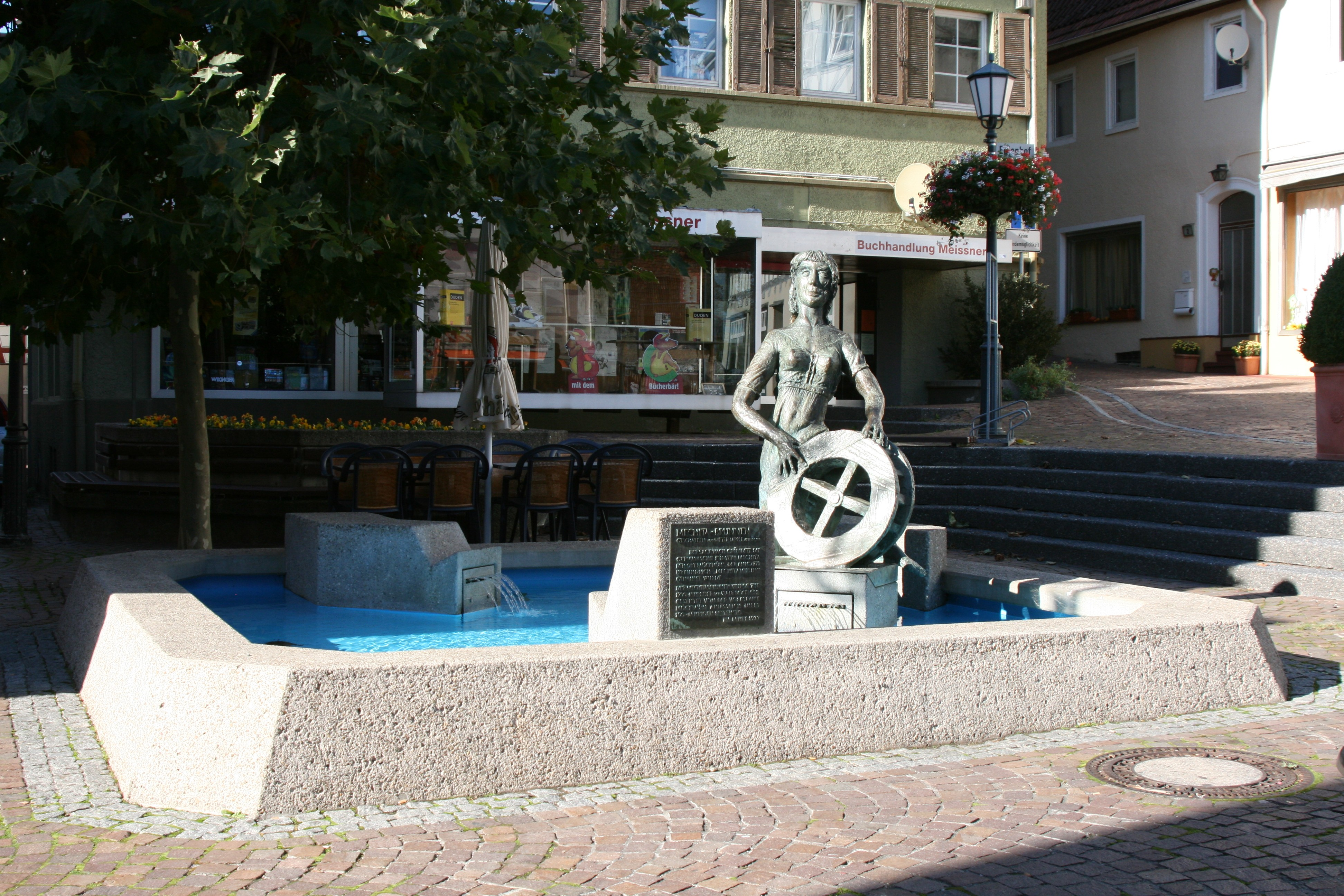 Mechita-Brunnen in Möckmühl, 1979 von Dieter Läpple geschaffen